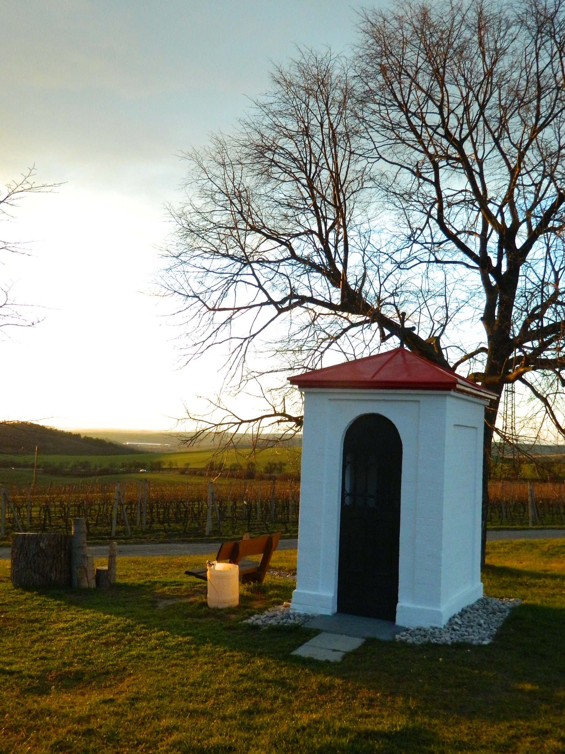 Kaplicka Nemcicky - Hrusove